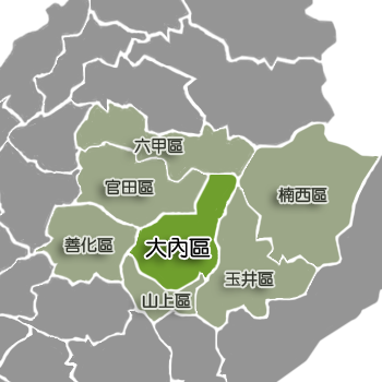 大內區相對位置